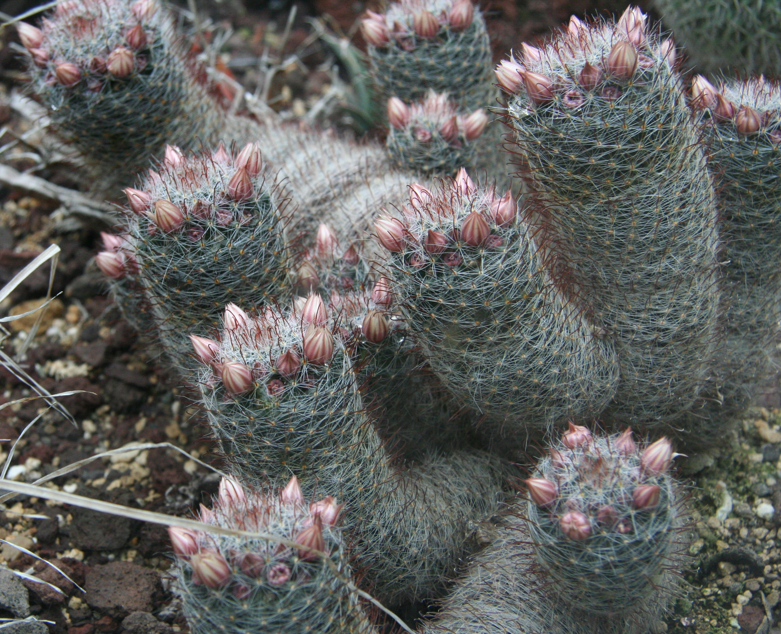 Mammillaria wildii im Botanischen Garten Köln